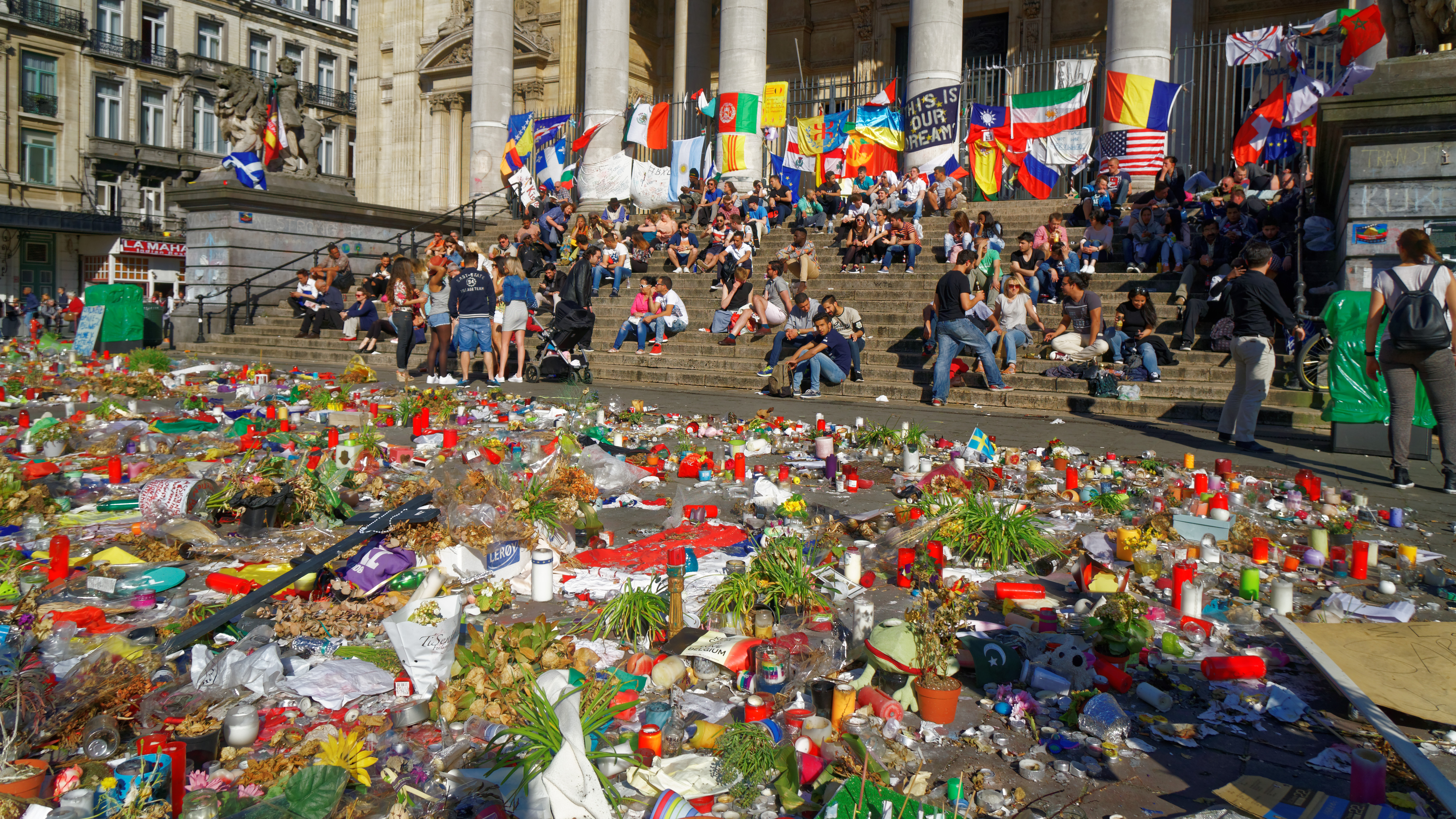 Rassemblement de personnes après les attentats de Bruxelles. Mémorial de la bourse